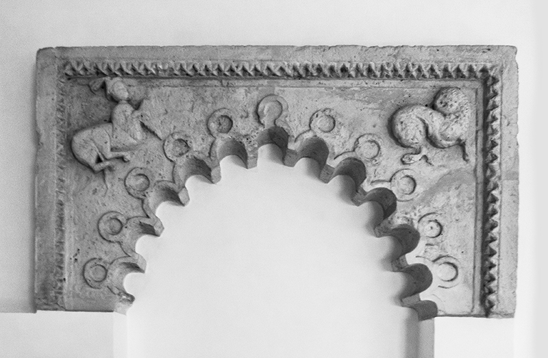 Arco mudejar de una puerta de una casa de la antigua aljama de Ciudad Real - Siglo XIII aprox.